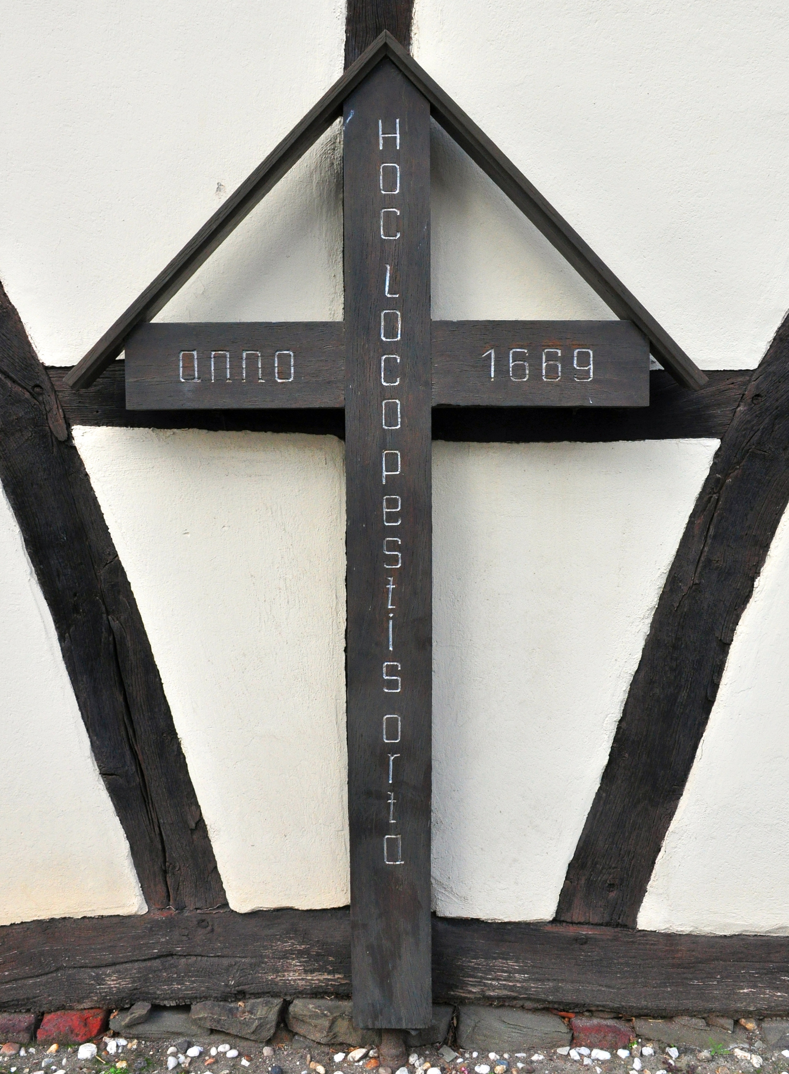 Pestkreuz Flerzheim Nr. 1. Inschrift: Hoc Loco Pestis Orta Anno 1669 (An dieser Stelle nahm die Pest ihren Anfang 1669). Standort: Nußbaumstraße 2